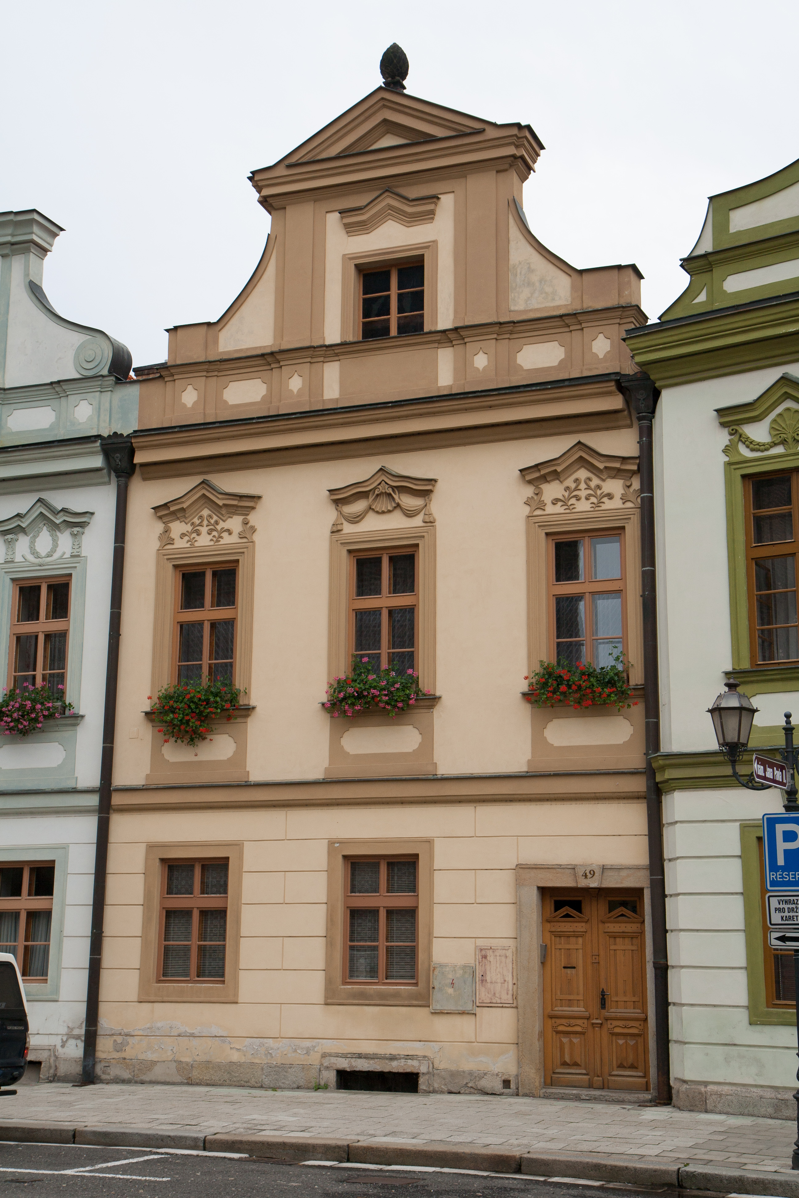 Kanovnický dům, stojí v řadě dalších kanovnických domů, poblíž se nachází katedrála sv. Ducha